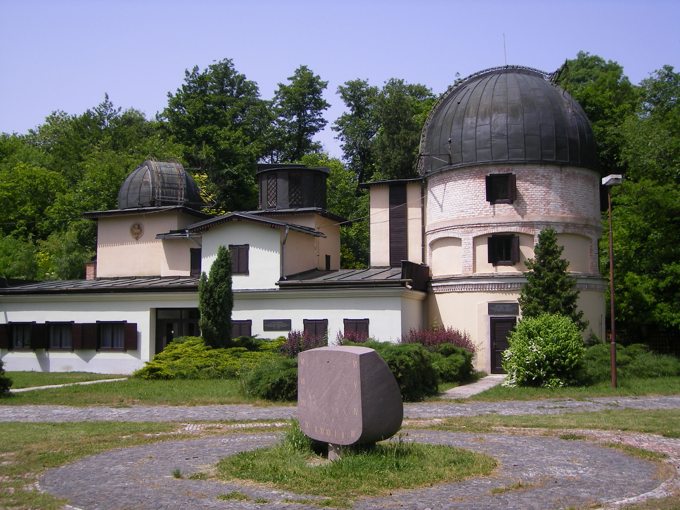 Ógyalla - régi obszervatórium